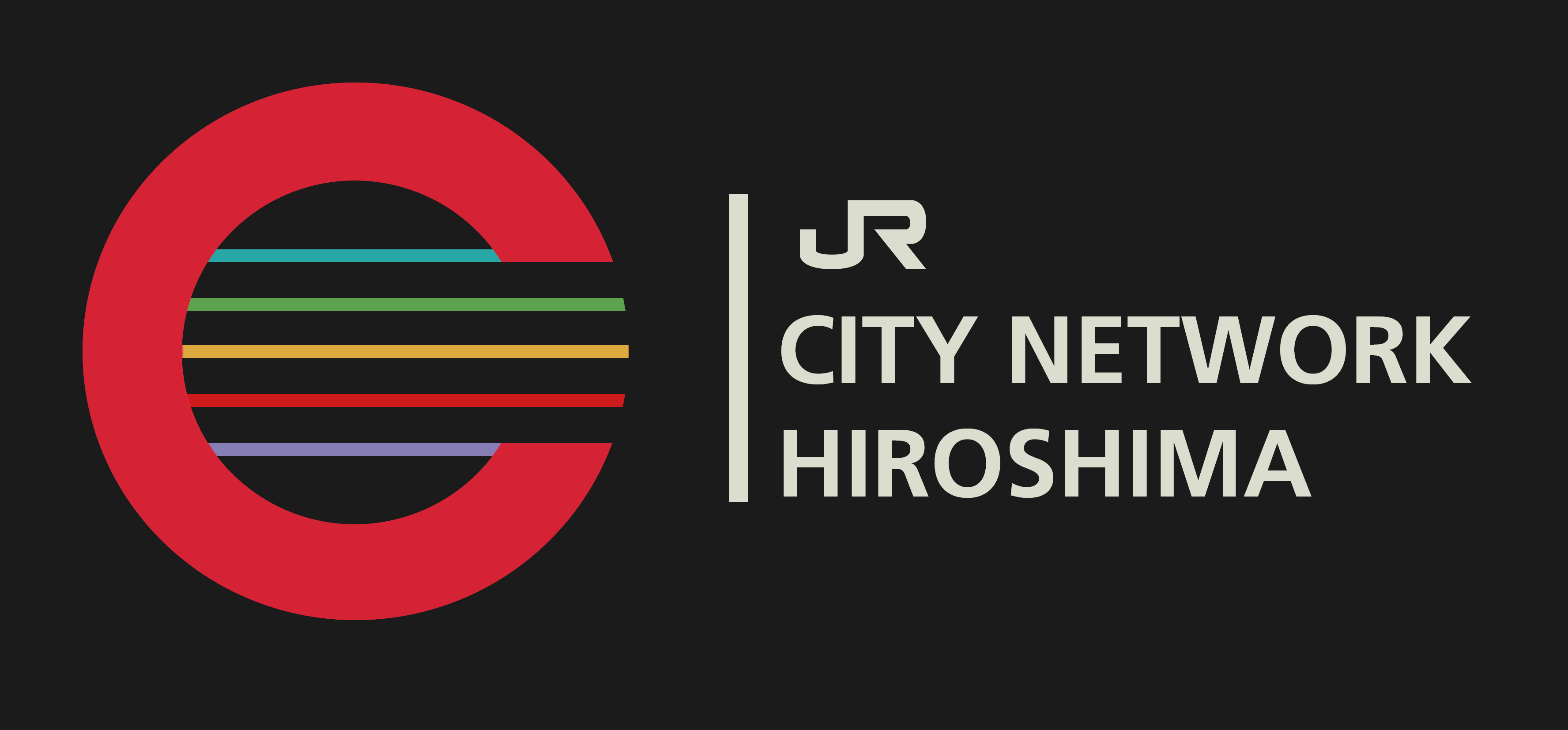 自身が作成。